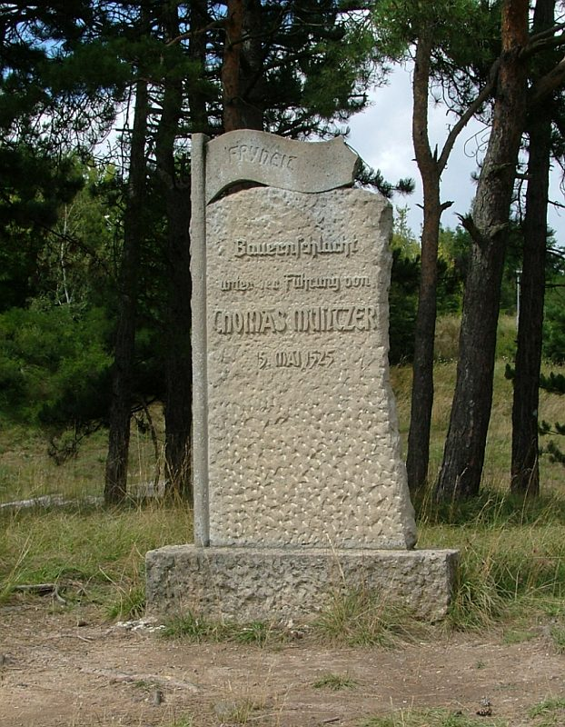 Bauernkriegsgedenkstein auf dem Schlachtberg bei Bad Frankenhausen. Inschrift: FRYHEIT Bauernschlacht unter der Führung von THOMAS MÜNTZER 15. Mai 1525 (Foto: H.Stolze)